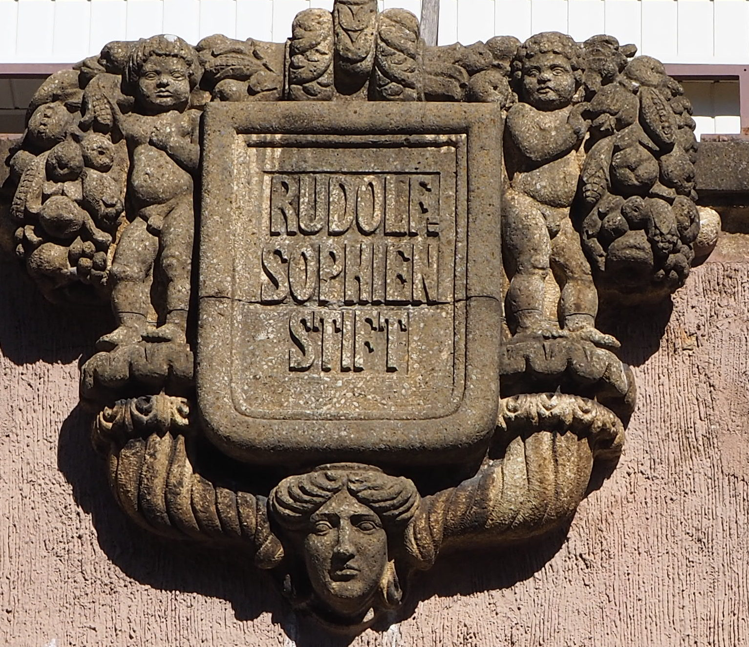 Ornament am Rudolf-Sophien-Stift